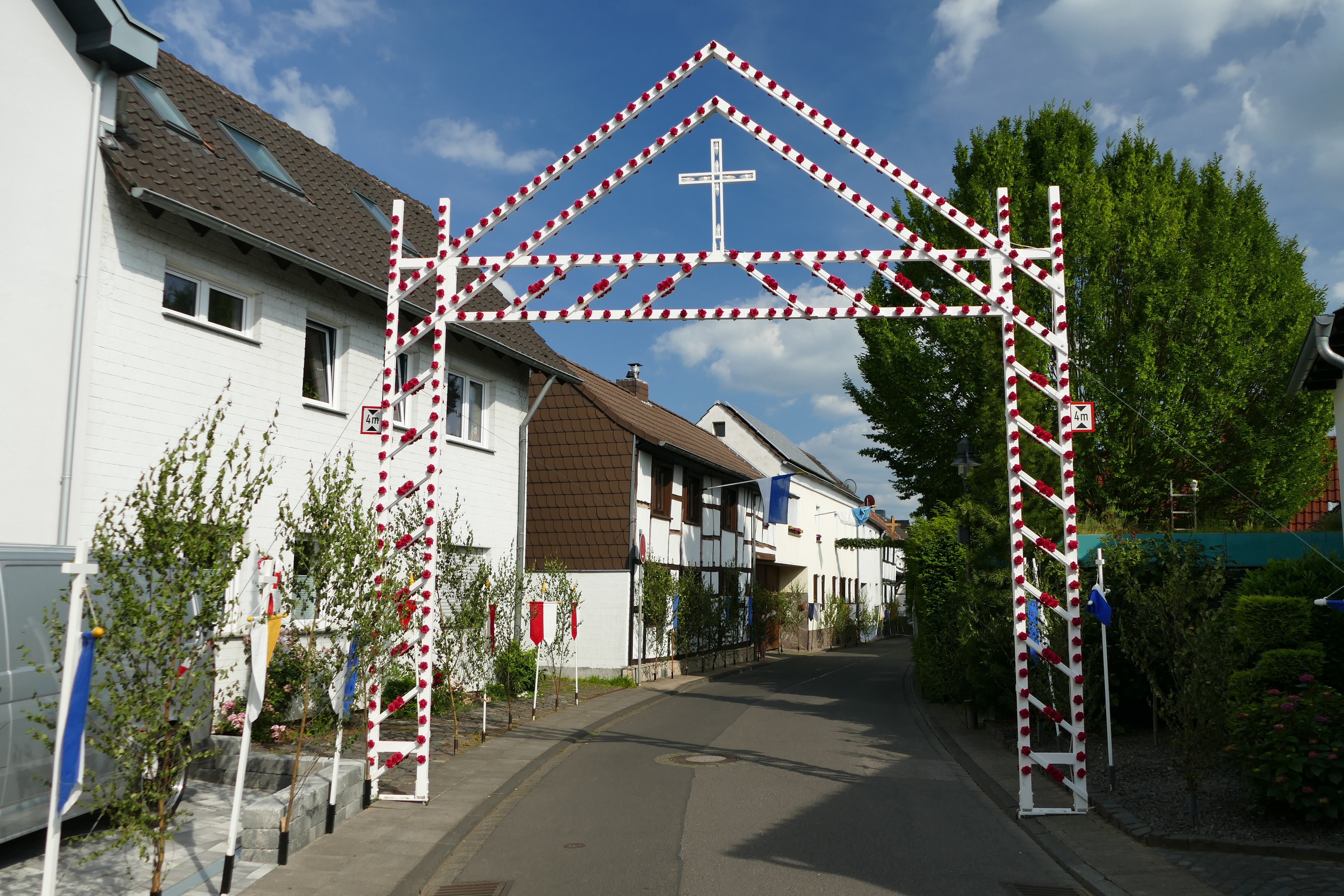 Rosenbogen auf der Schmittstraße in Buschhoven, anlässlich des jährlich stattfindenden Rosenfestes. Von Norden aus gesehen.